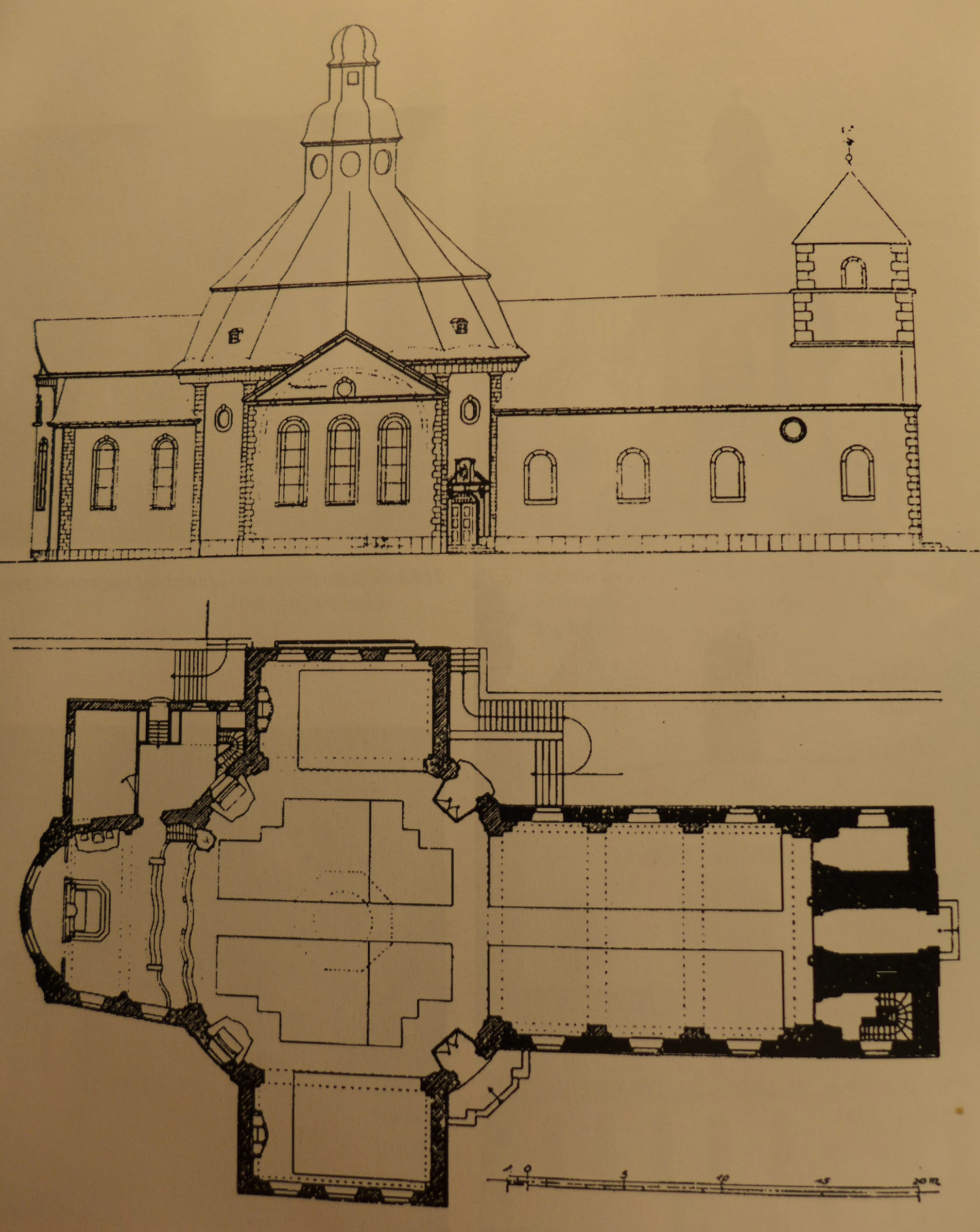 St. Martin (Siersburg), Seitenansicht und Grundriss von Peter Marx, Ausführungsentwurf